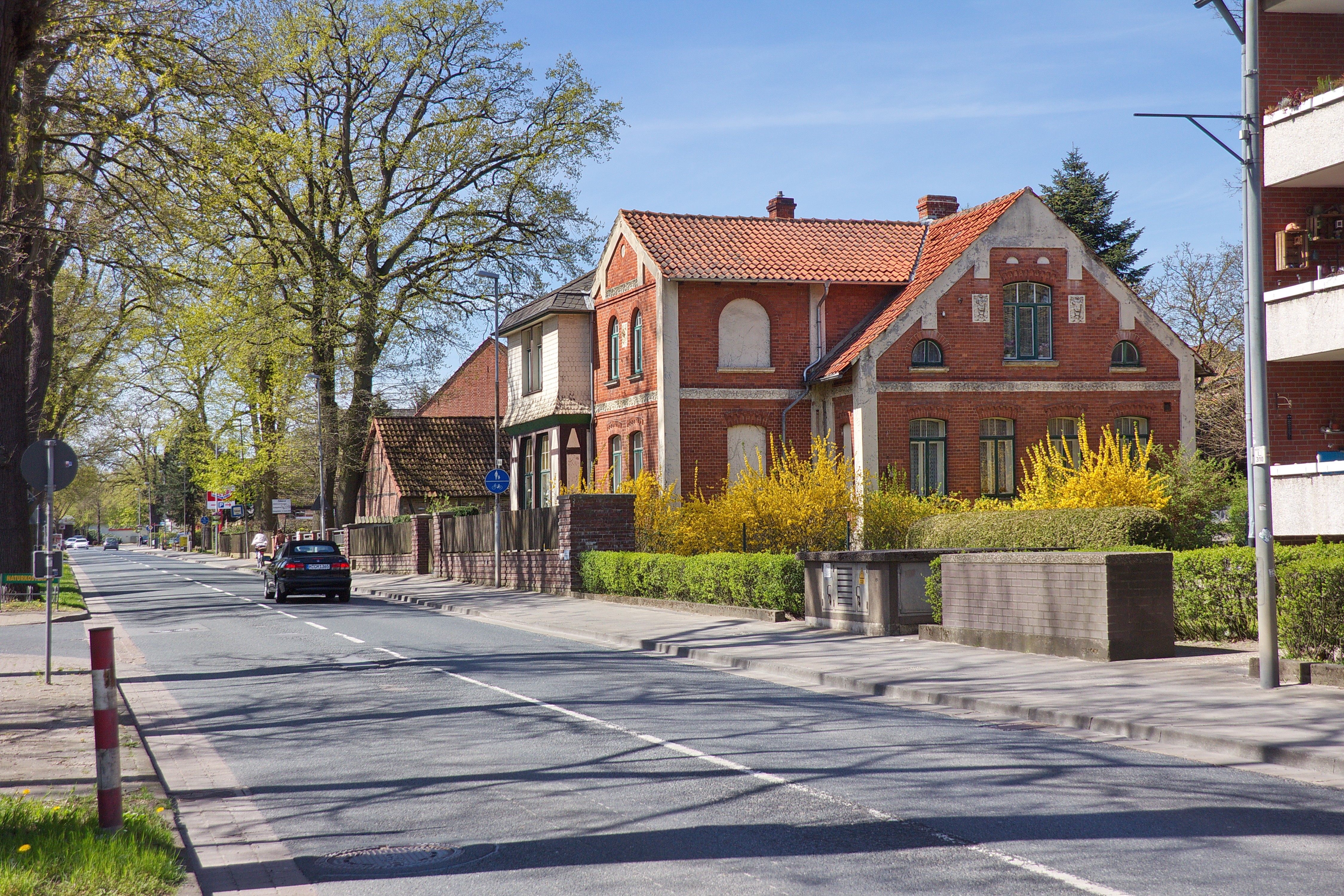 Wedemarkstraße in Mellendorf (Wedemark), Niedersachsen, Deutschland